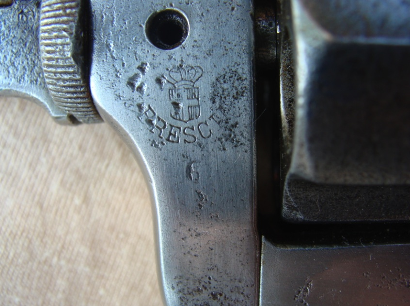 Marchio Regio Arsenale di Brescia su revolver 1889 ordinanza italiana versione Ufficiali